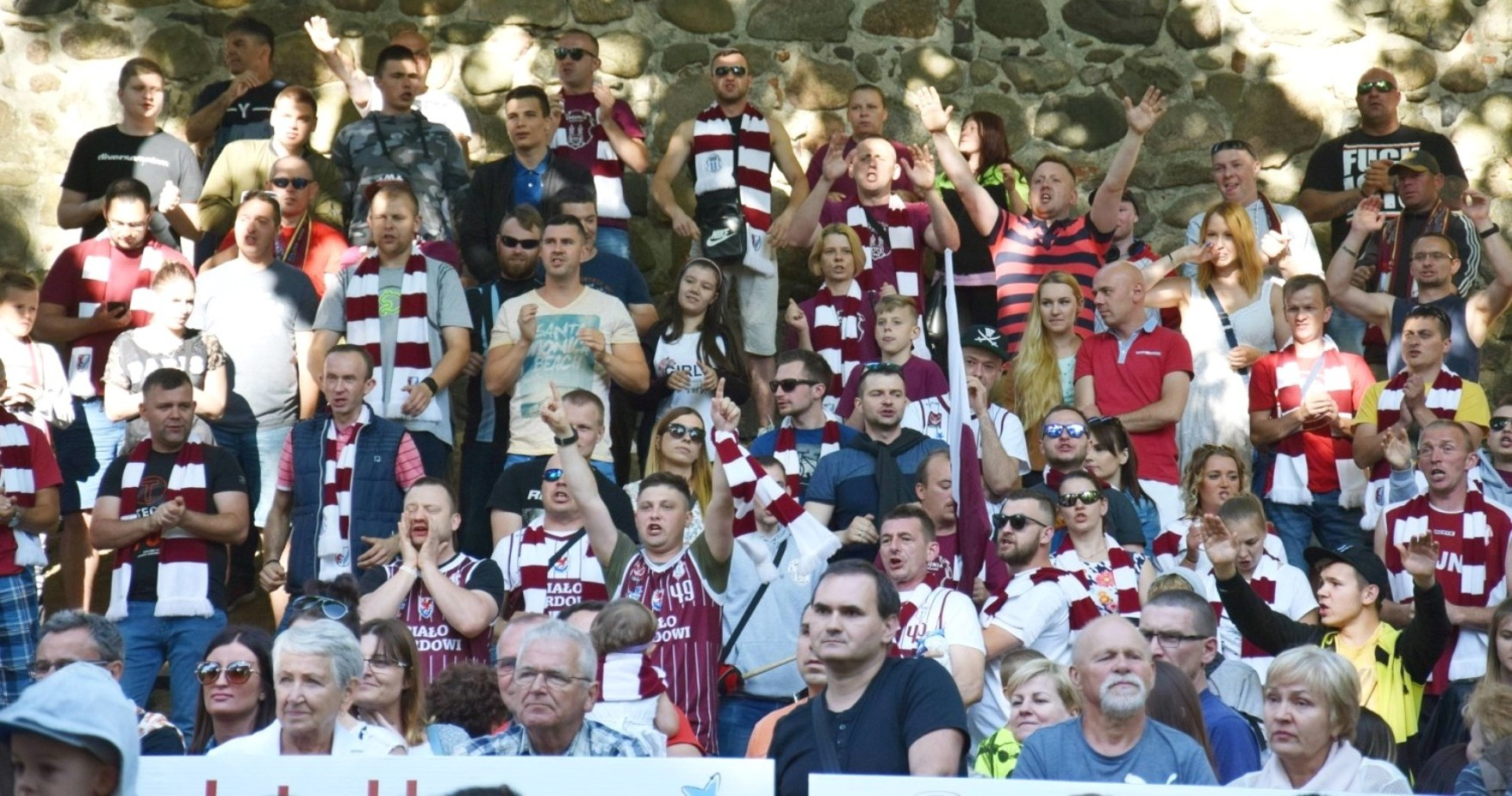 Kibice Spójni podczas koszykarskiej fety (19.05.2018)